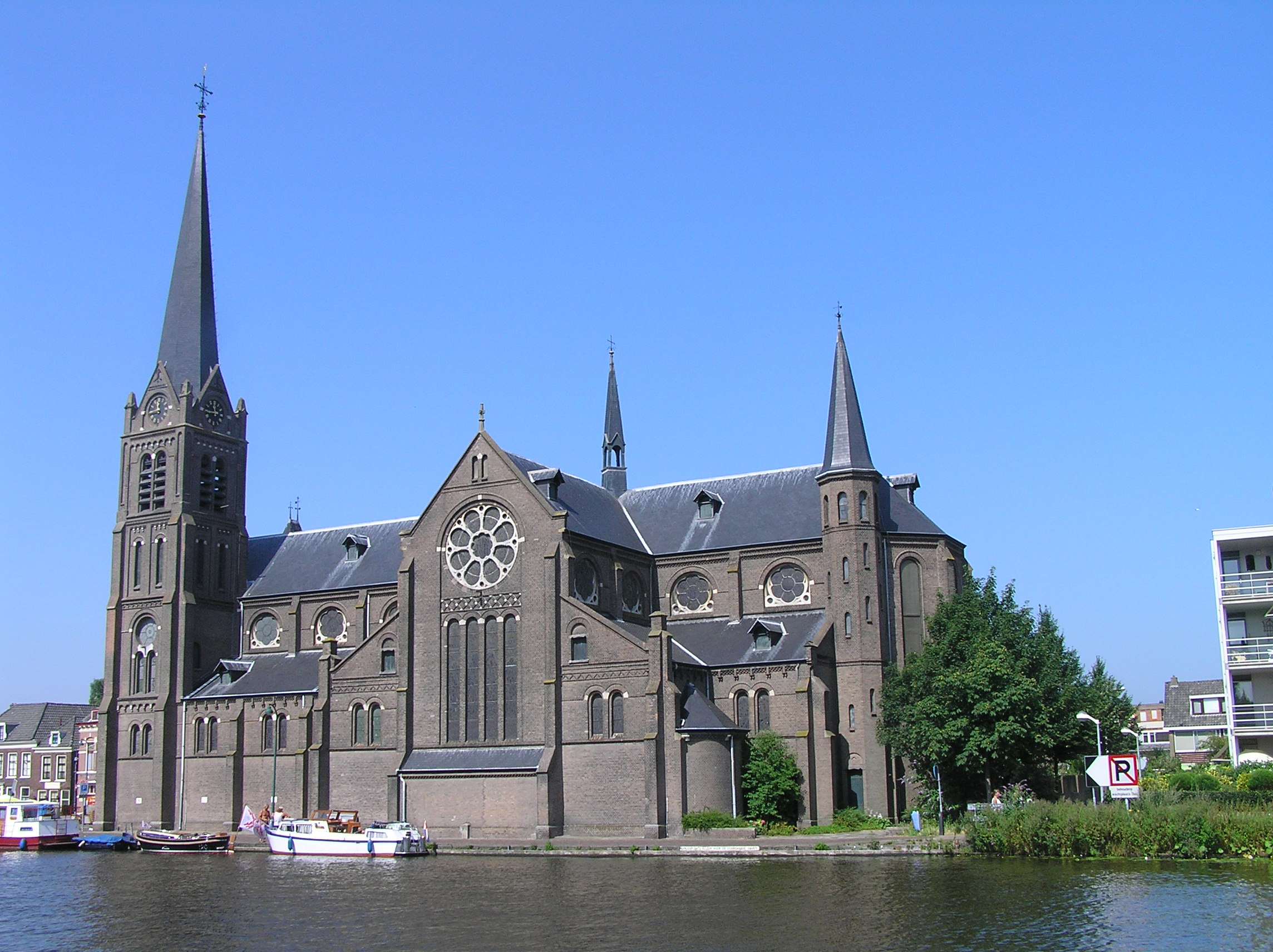 foto van auteur John Al, juli 2006